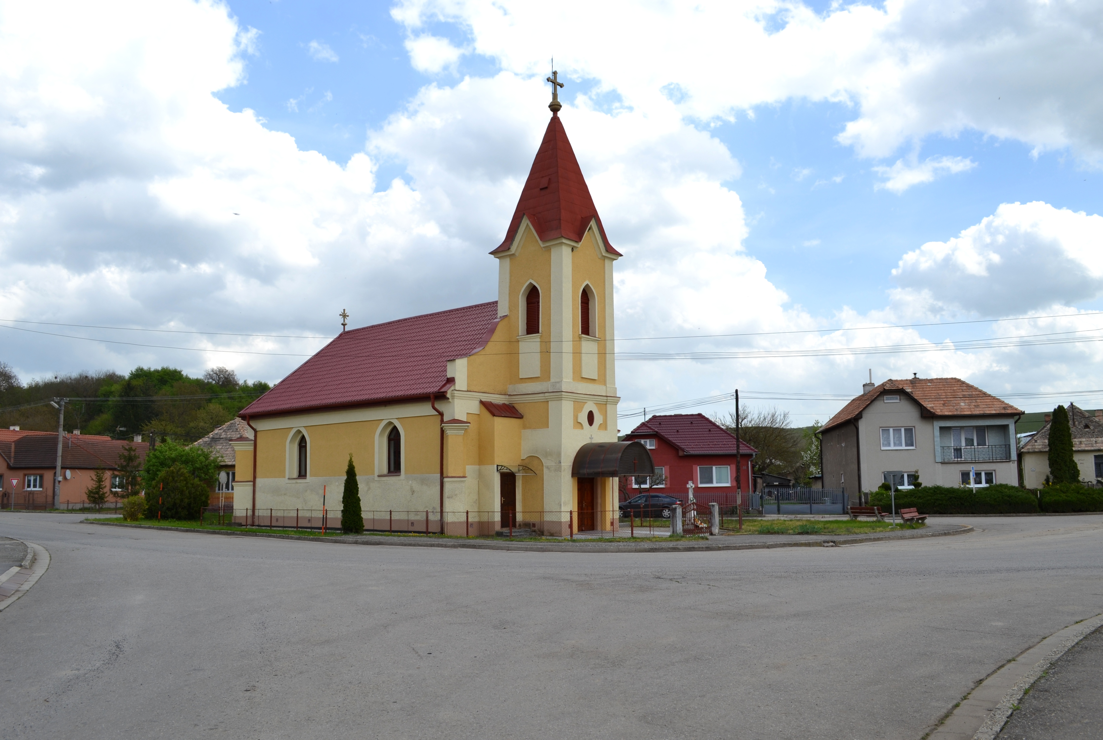 Dolné Zahorany, Kostol sv. Michala Archanjela